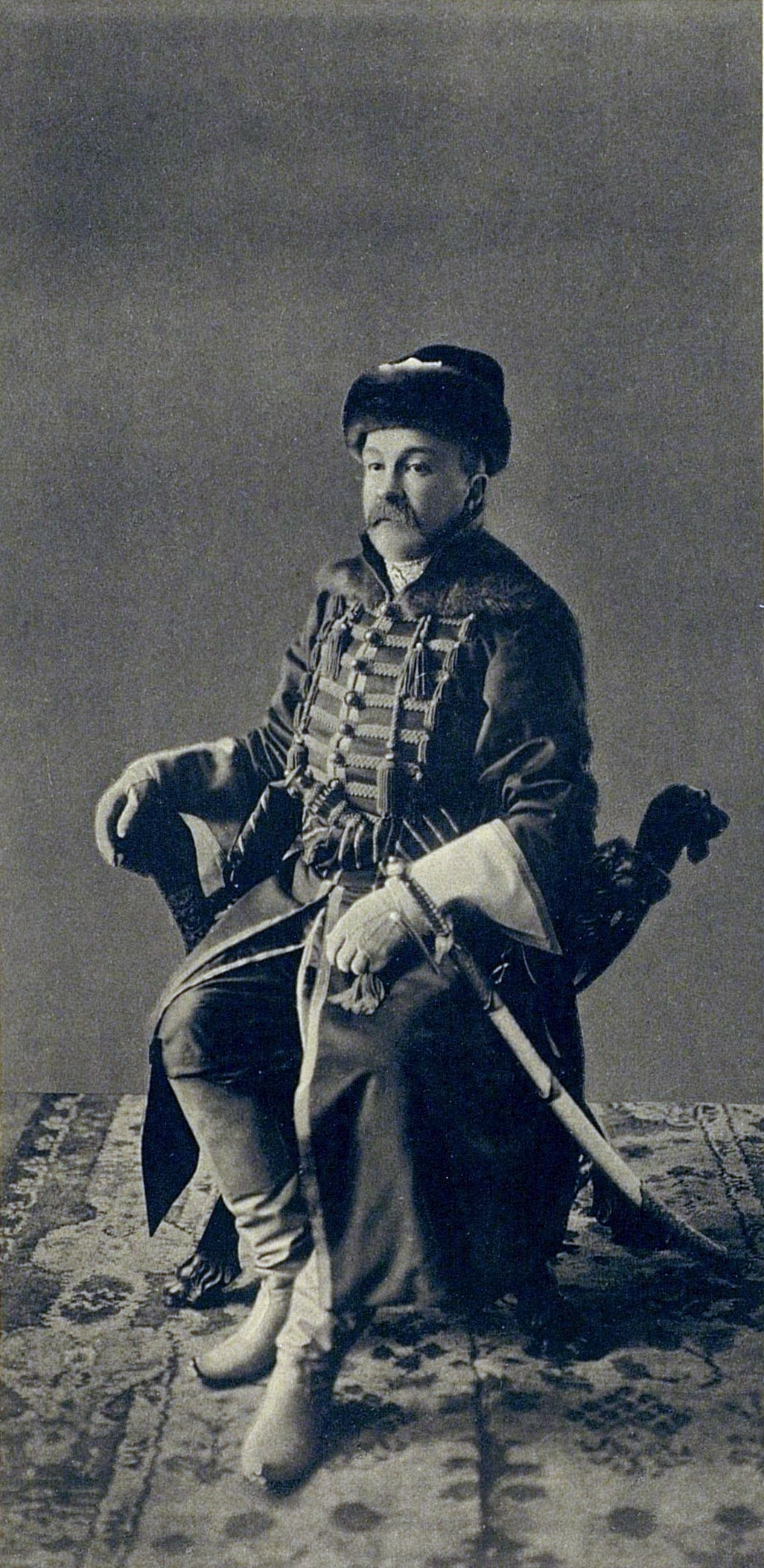 Генерал-Адъютант Пётр Павлович Гессе в костюме начальника Бутырского полка XVII века